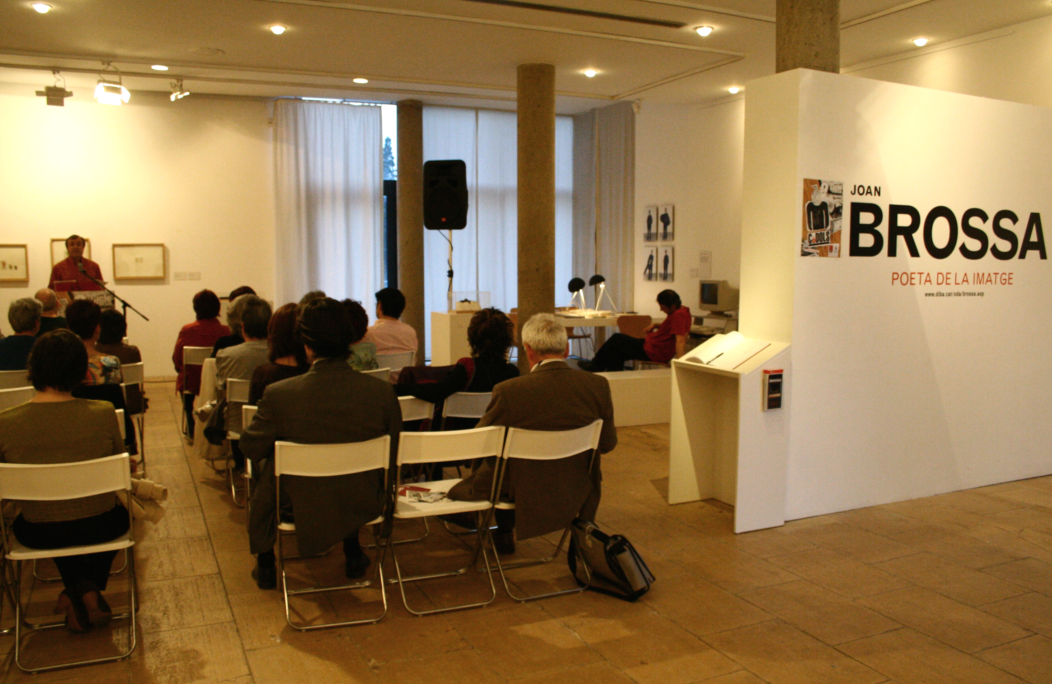 Núria Candela diu Joan Brossa a Còdols 2007